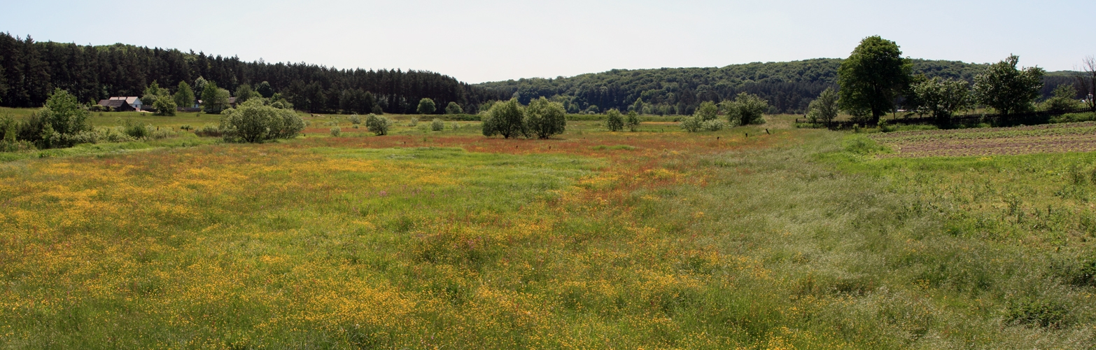 В Яворовском районе Львовской области